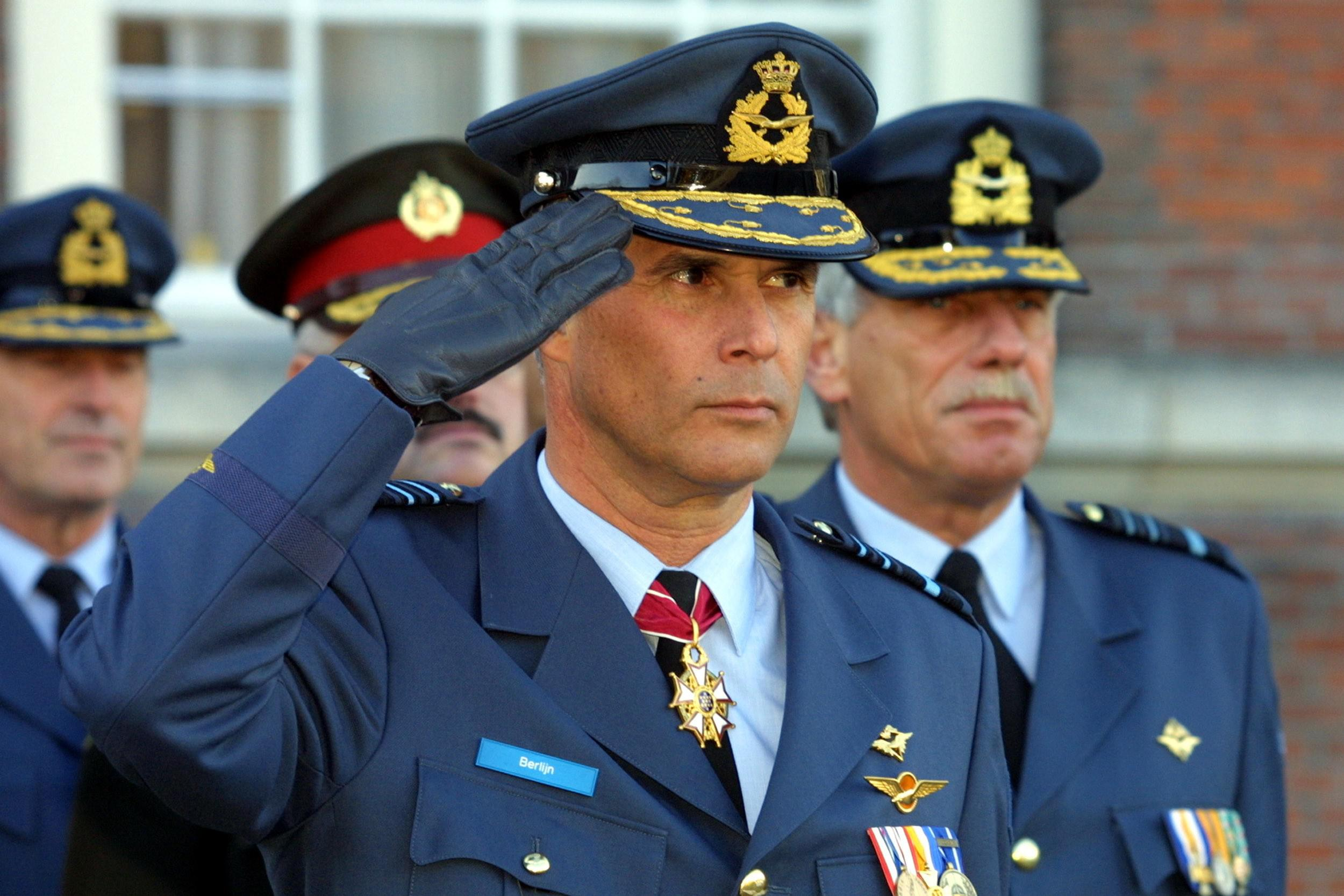 Bevelhebber der Luchtstrijdkrachten Dick Berlijn salueert bij het 175-jarig bestaan van de Koninklijke Militaire Academie